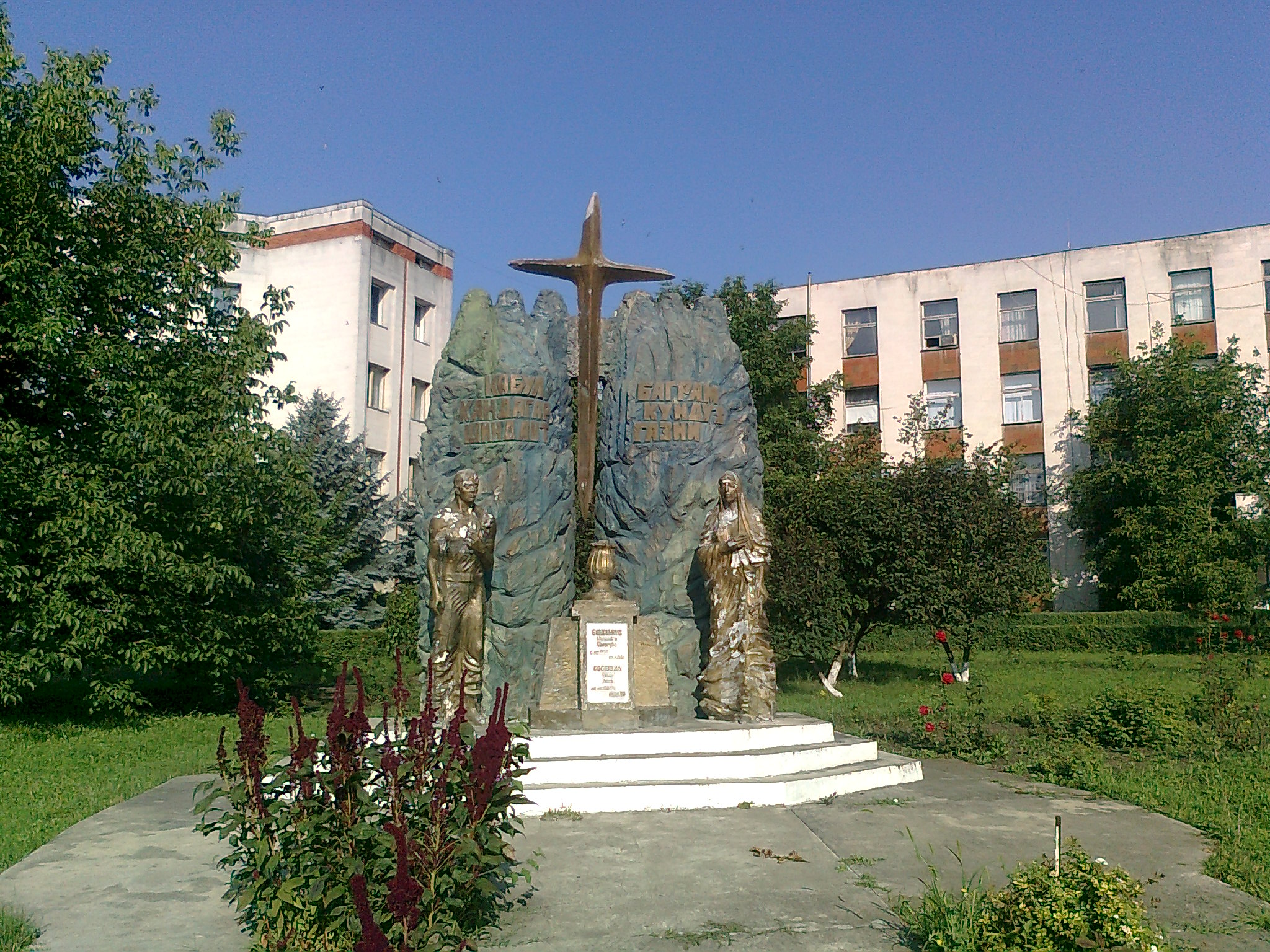 Glodeni, Republica Moldova